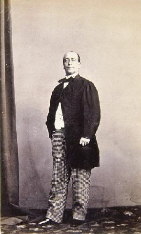 Vicente Caltañazor, fotografía de J. Laurent. Museo de Historia de Madrid